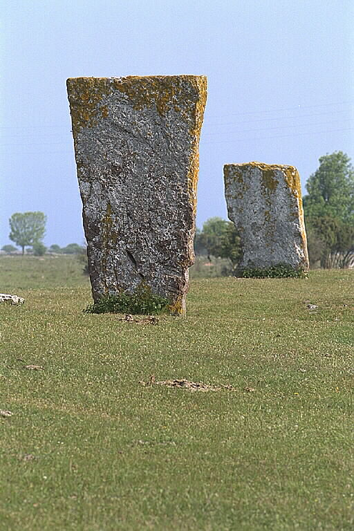 Naturreservat. Motiv: Kungsstenarna vid Ottenby Nyckelord: Naturreservat, Riksintressen, Världsarv Kategori: Grav markerad av rest sten/block Naturreservat.